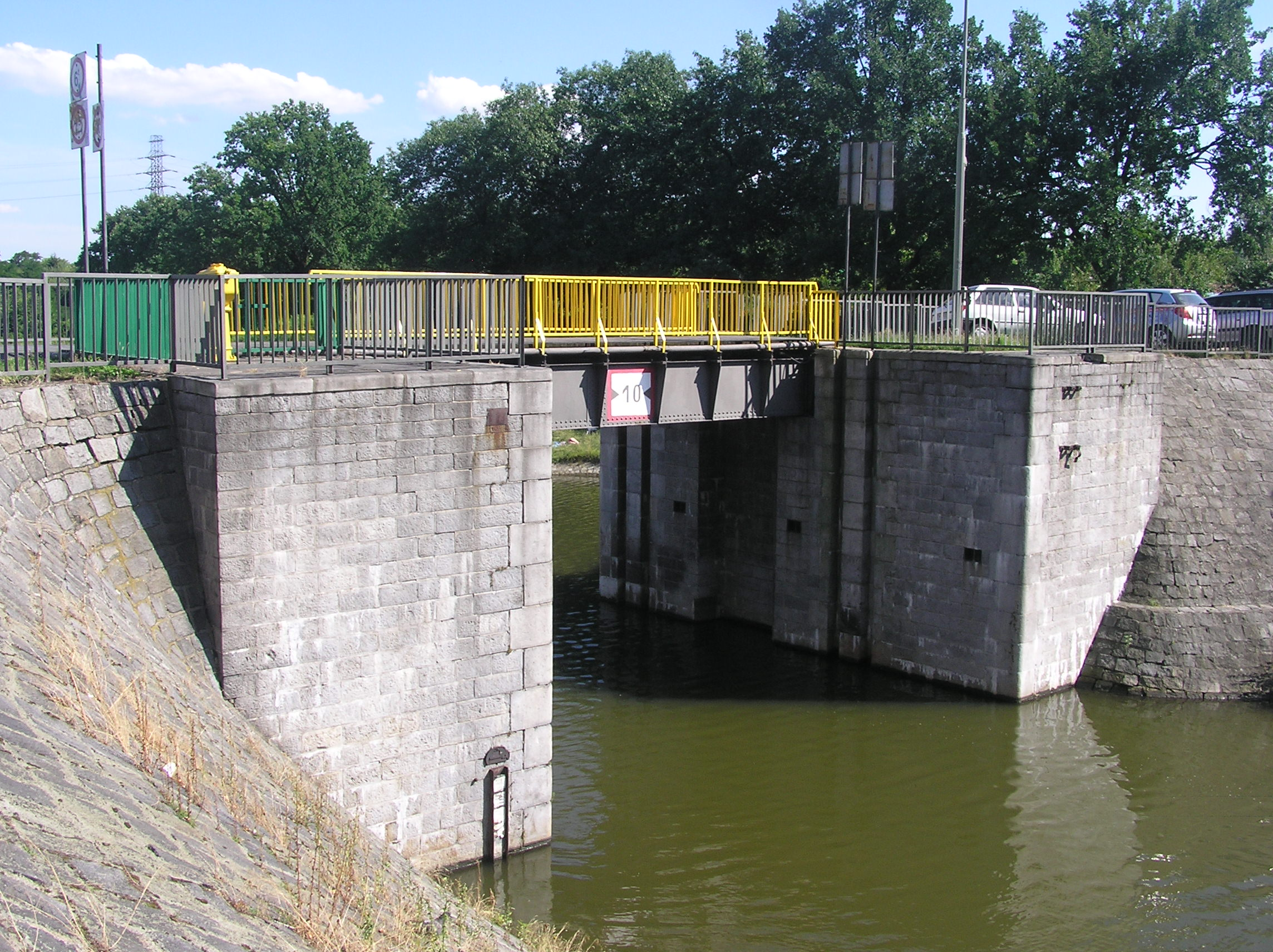 Wrocław, Ołbin, Kanał Miejski, Brama Przeciwpowodziowa, Most Burzowy